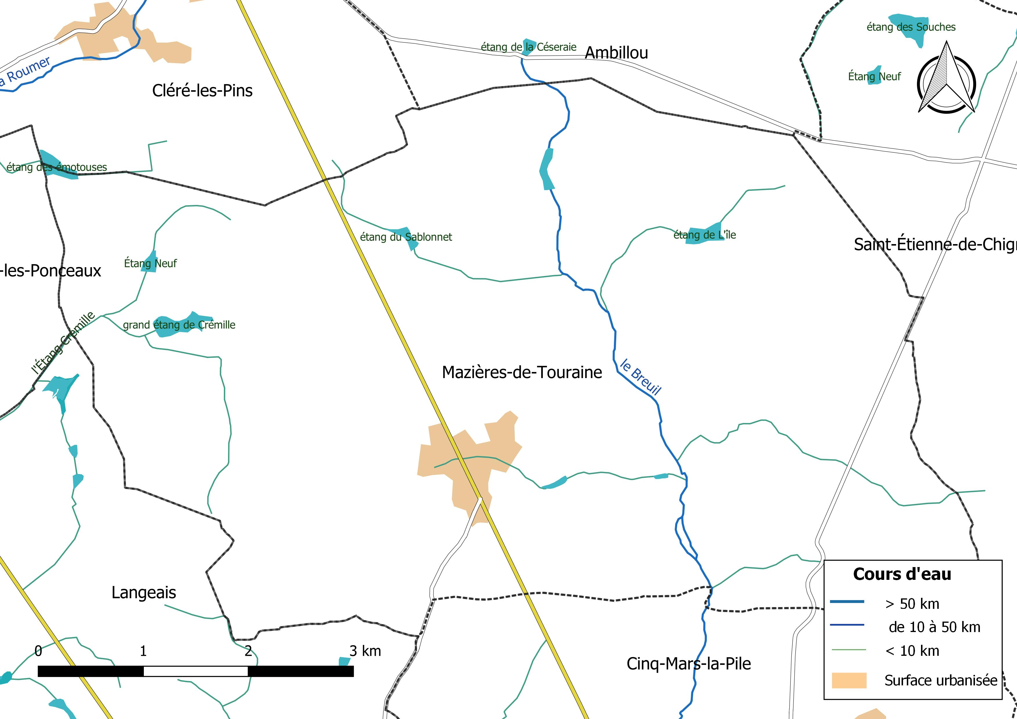 Carte du réseau hydrographique de la commune de Mazières-de-Touraine (France).